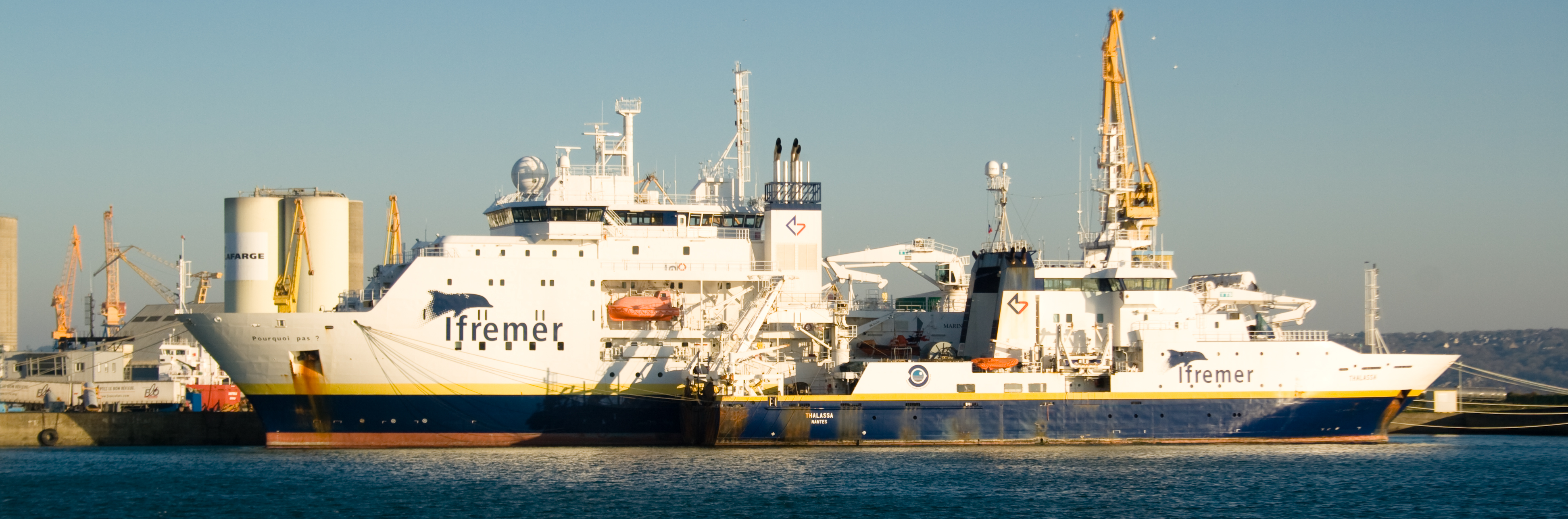 Le Pourquoi pas ? et la Thalassa, de l'Ifremer, dans le port de Brest.